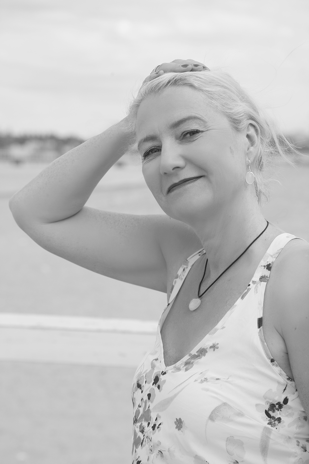 Photographer: Goran James Djordjevic